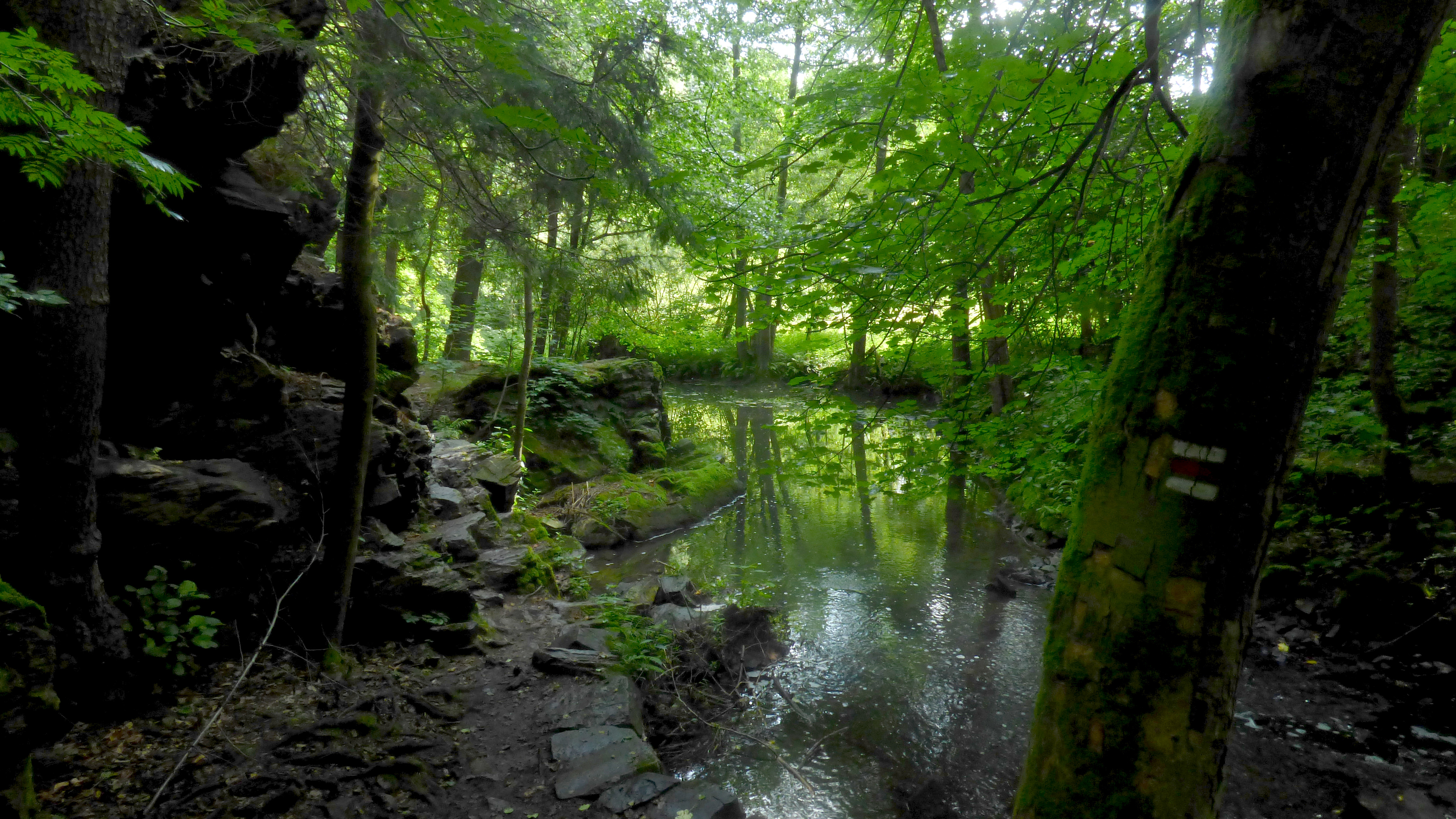 Doubrava mezi Bílkem a Chotěboří